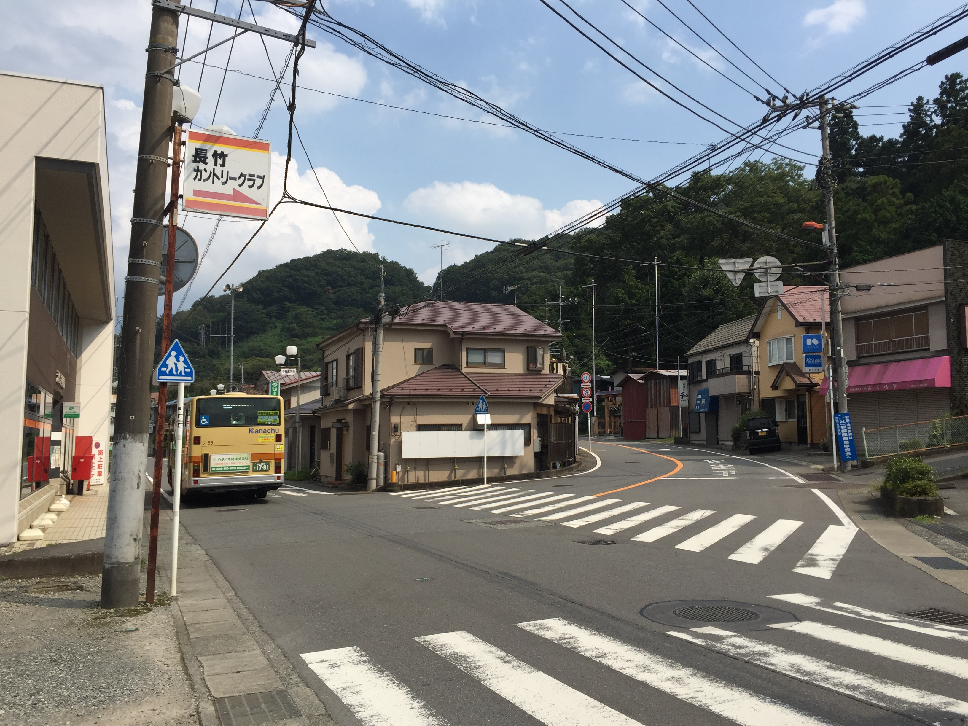 神奈川県道513号（相模原市緑区中野、津久井郵便局前）。県道65号との交点で右方向が513号単独区間の鳥屋方向。直進方向が城山方向で県道65号と重複する。